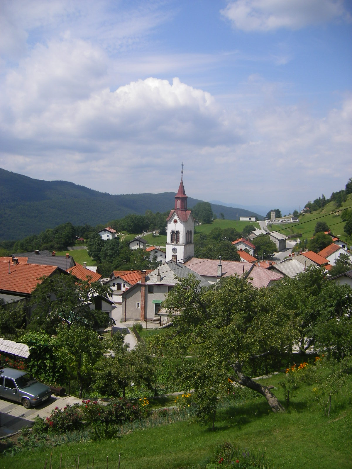 Podkraj (Ajdovščina municipality)